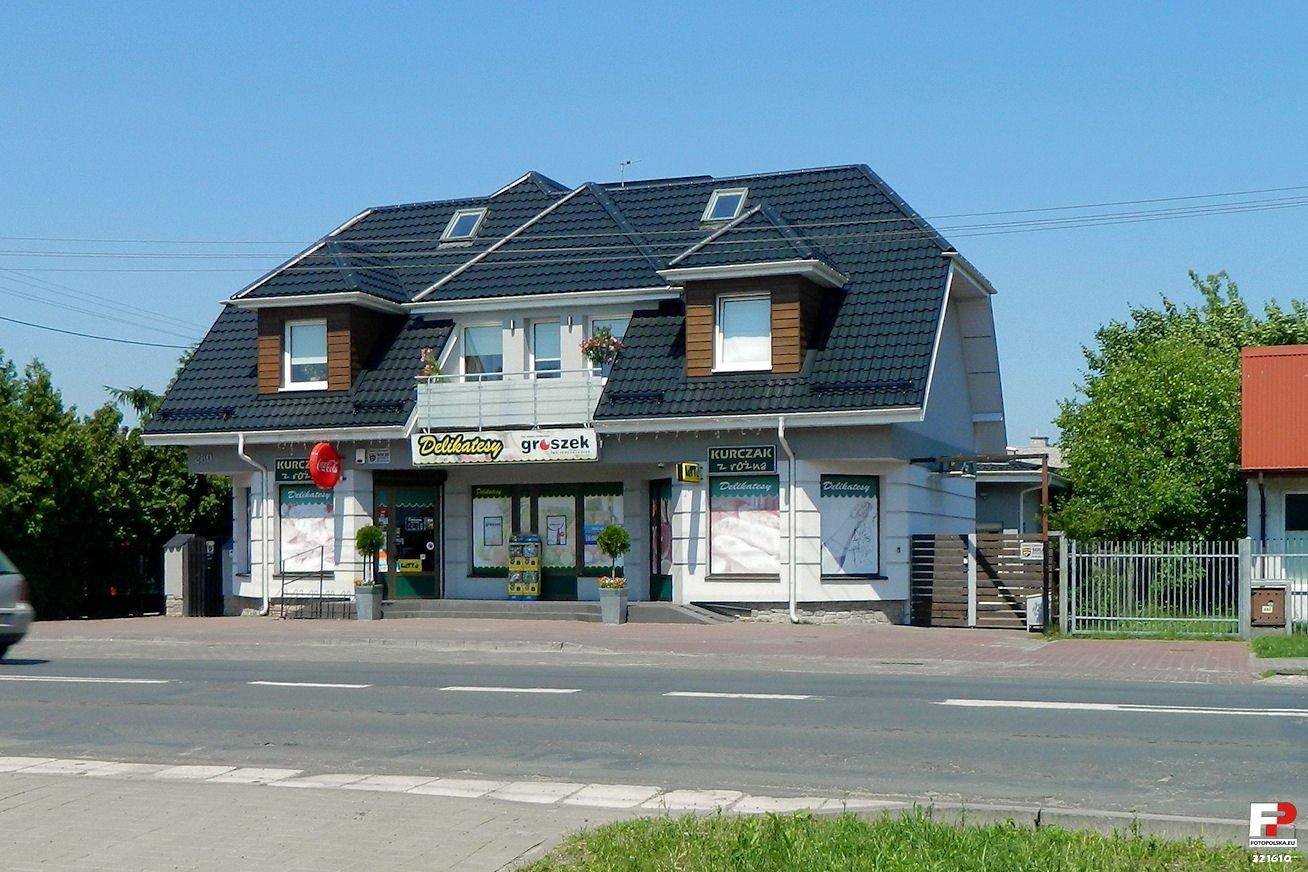 Ul. Warszawska 280